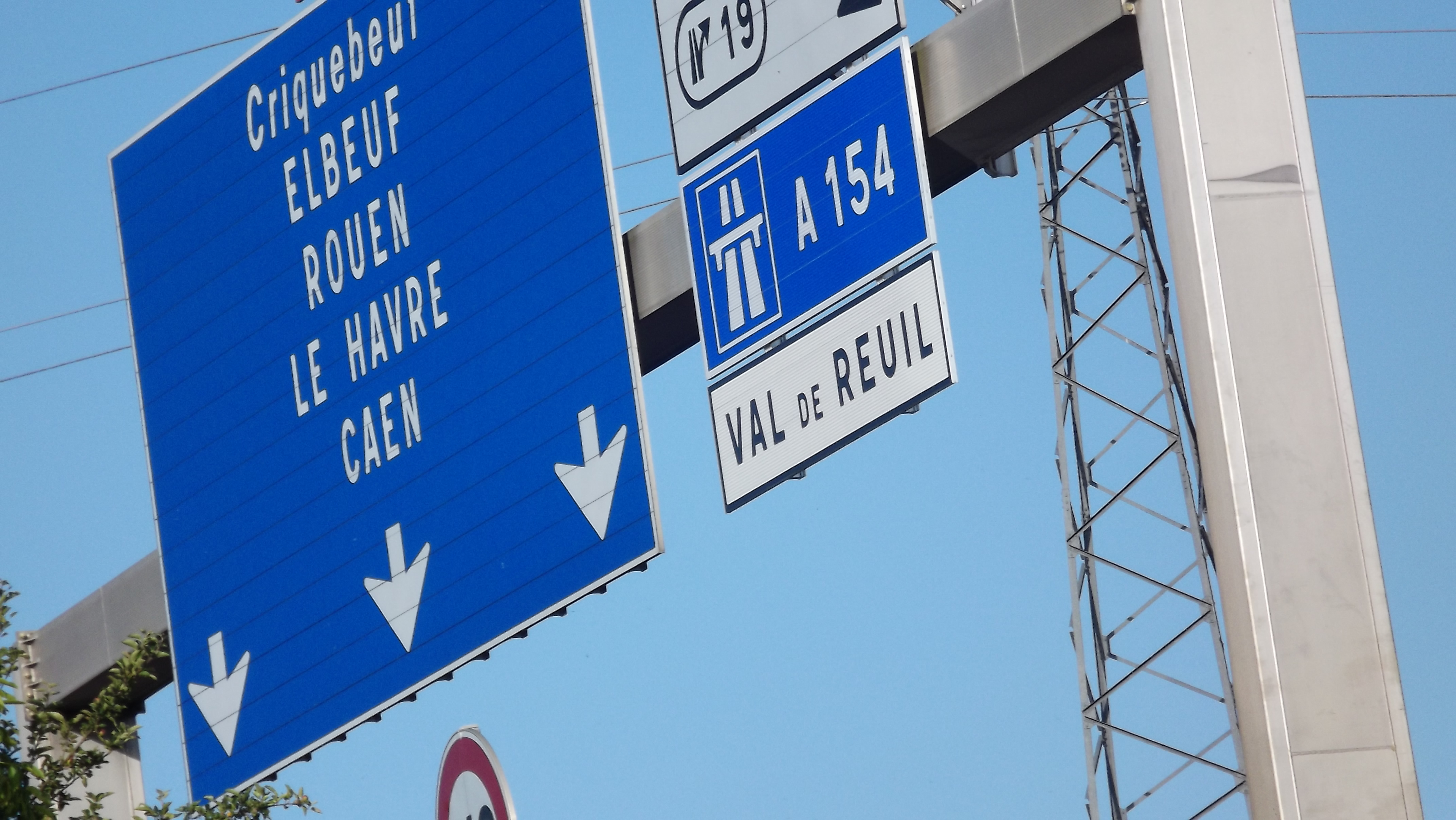 Panneau de l'A13, pris au bord de la sortie vers Val-de-Reuil.